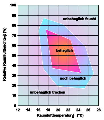 Gefühlte Behaglichkeit